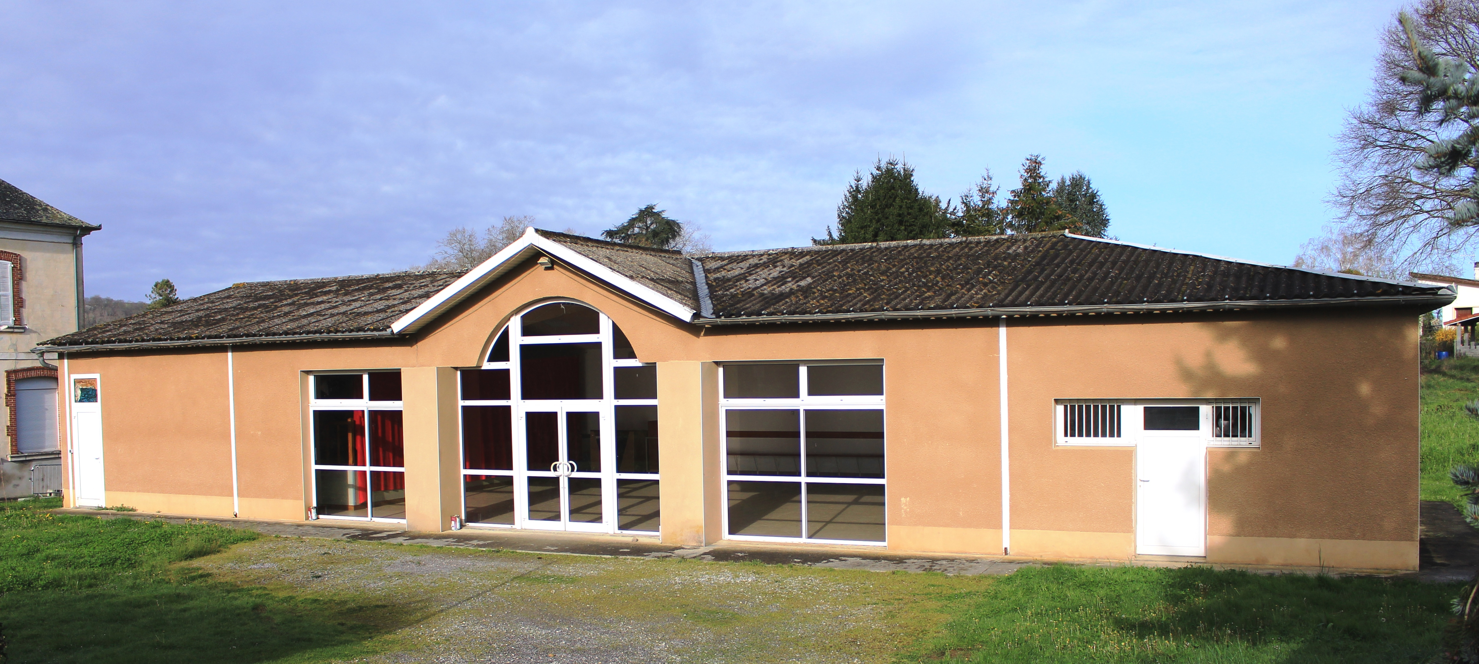 Salle des fêtes de Lanespède (Hautes-Pyrénées)